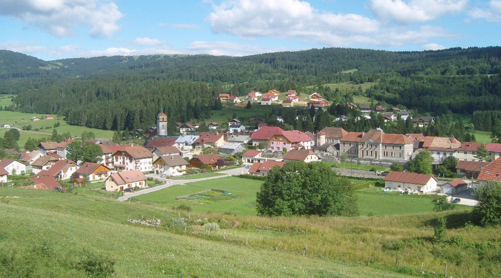 Rochejean - vue générale en été